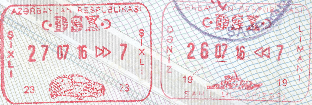 Въездной и выездной штампы Государственной пограничной службы Азербайджана.